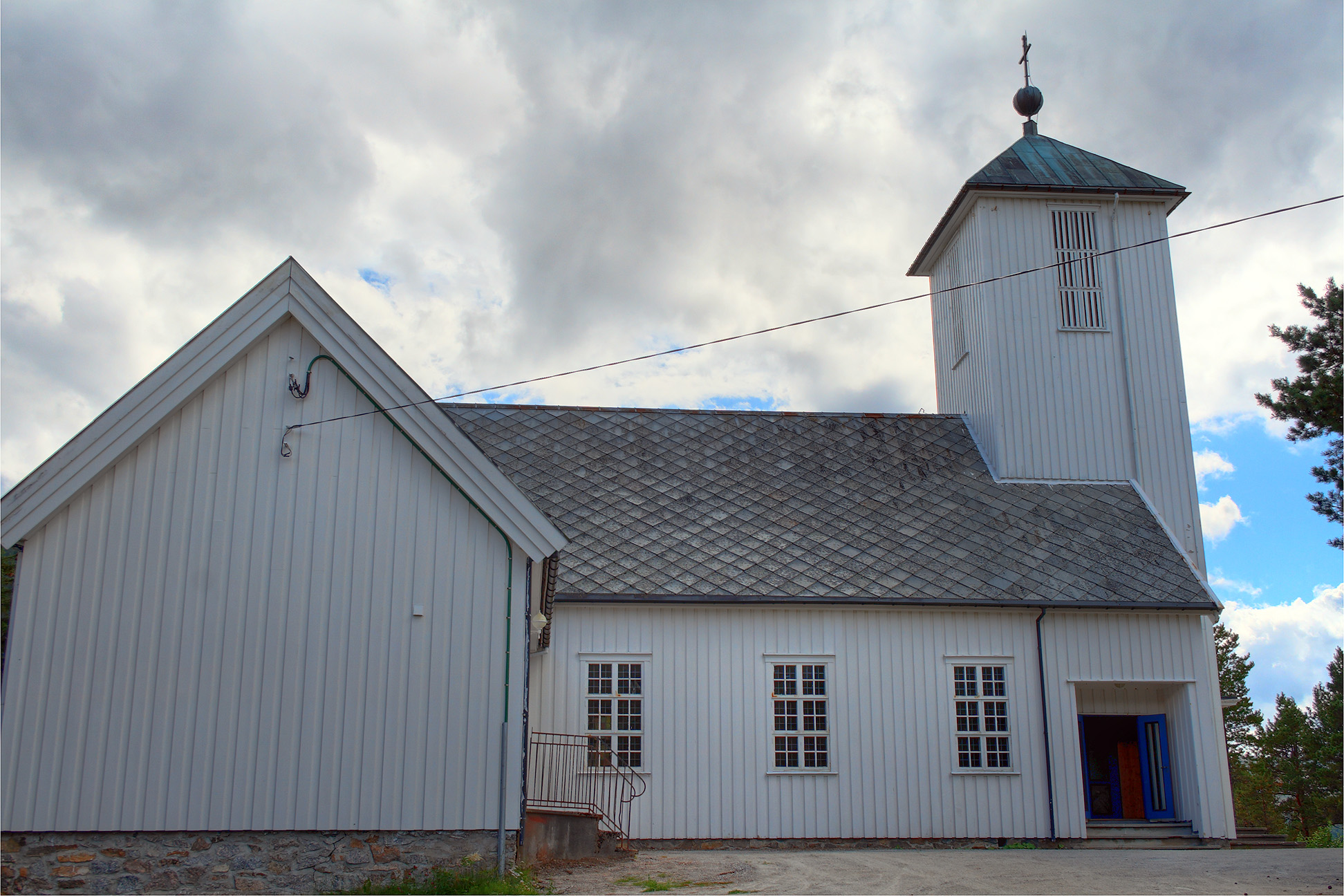 Salsbruket kapell (Salsbruket chapel)